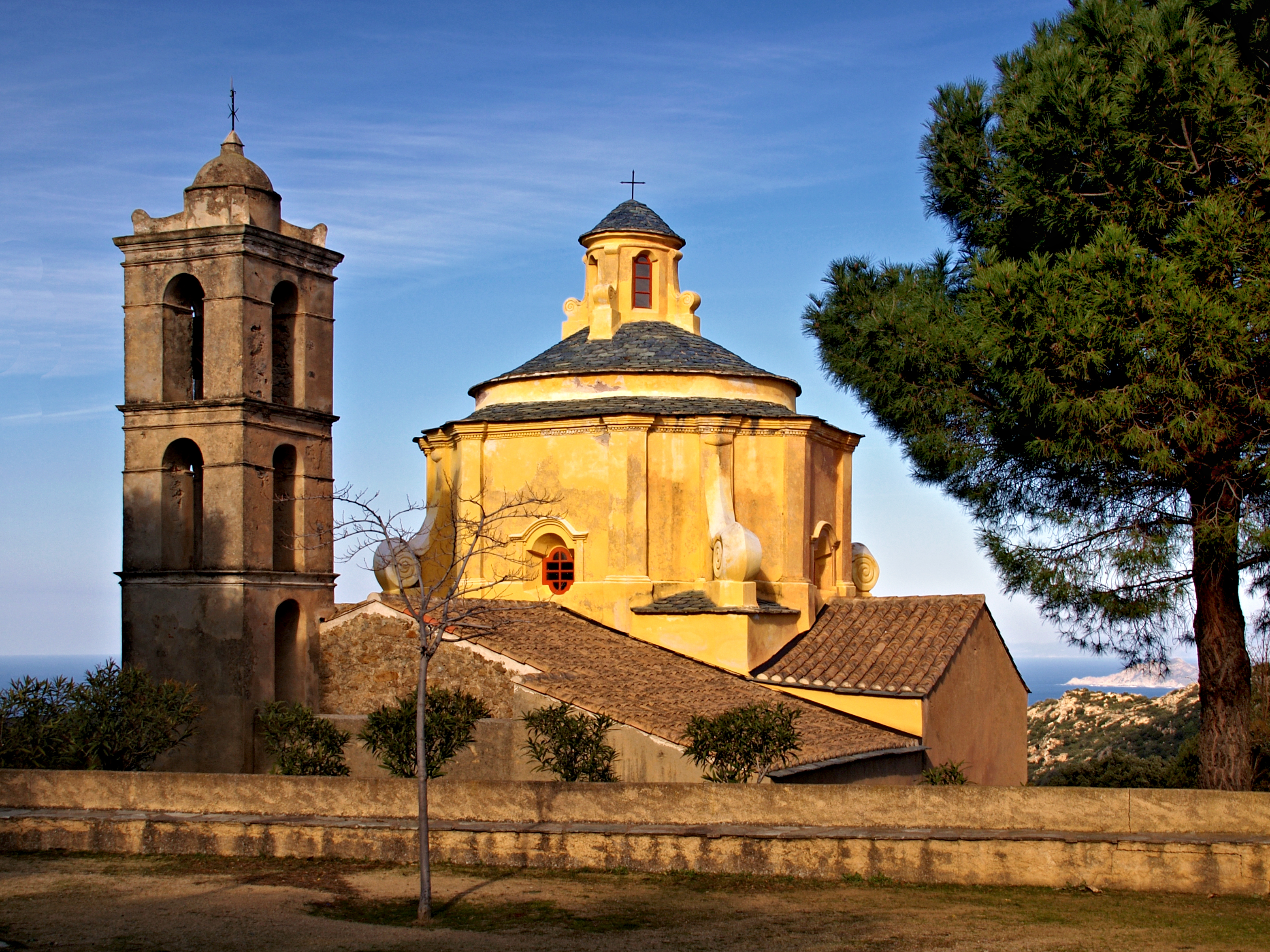 Monticello (Corsica) - Église Saint-François (MH)